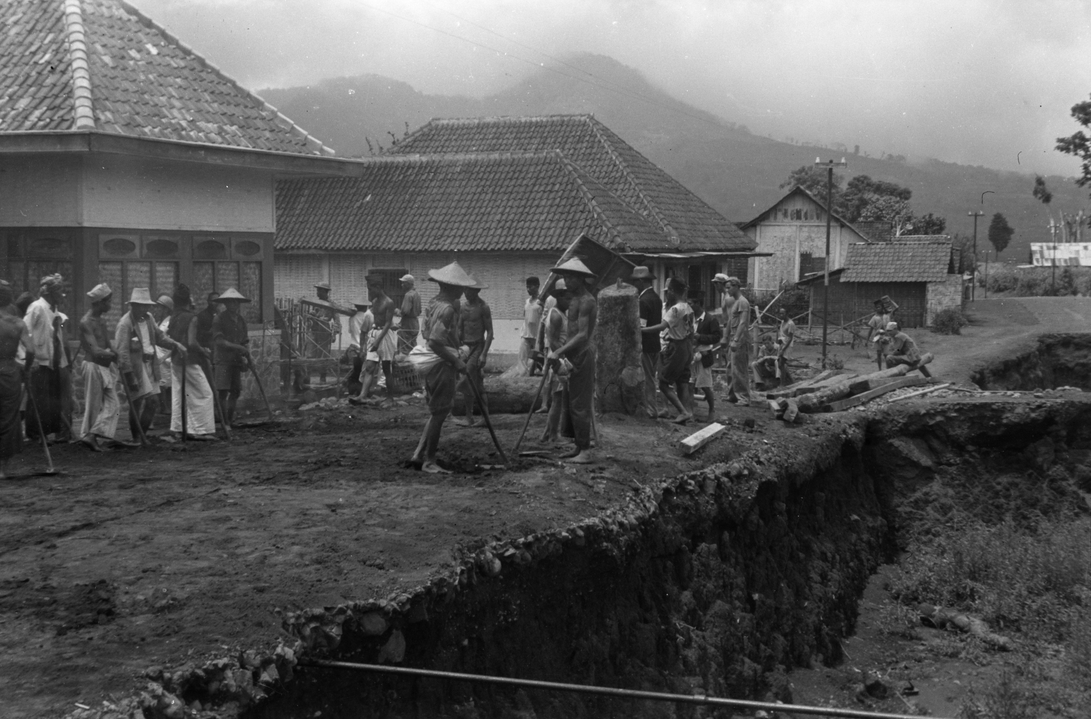 Collectie / Archief : Fotocollectie Dienst voor Legercontacten Indonesië Reportage / Serie : [DLC] Poedjon en omgeving, westelijk van Batoe Beschrijving : Te Poedjon, westelijk van Batoe (Oost Java) waren door Republikeinse strijdkrachten een aantal gaten in de wegen gegraven. Datum : 3 januari 1948 Locatie : Batu, Indonesië, Nederlands-Indië, Pudjon Fotograaf : Vleuten, [...] van / DLC Auteursrechthebbende : Nationaal Archief Materiaalsoort : Negatief (zwart/wit) Nummer archiefinventaris : bekijk toegang 2.24.04.02 Bestanddeelnummer : 2852